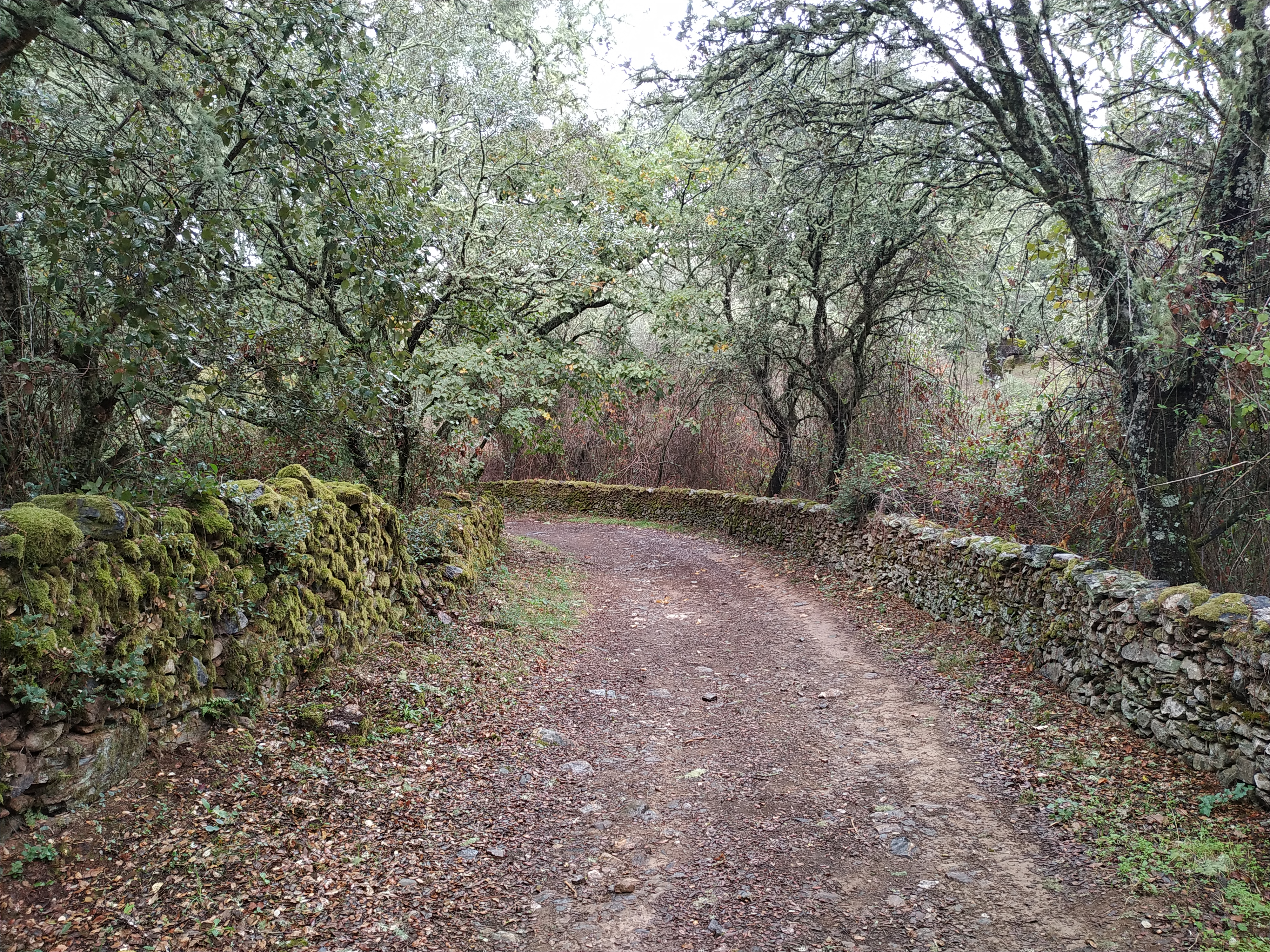 Imagen de una parte del camino que cruza el bosque de los Castaños en Cabeza La Vaca